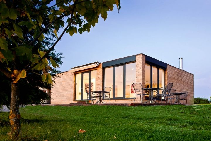 Zázemí golfového centra lozorno